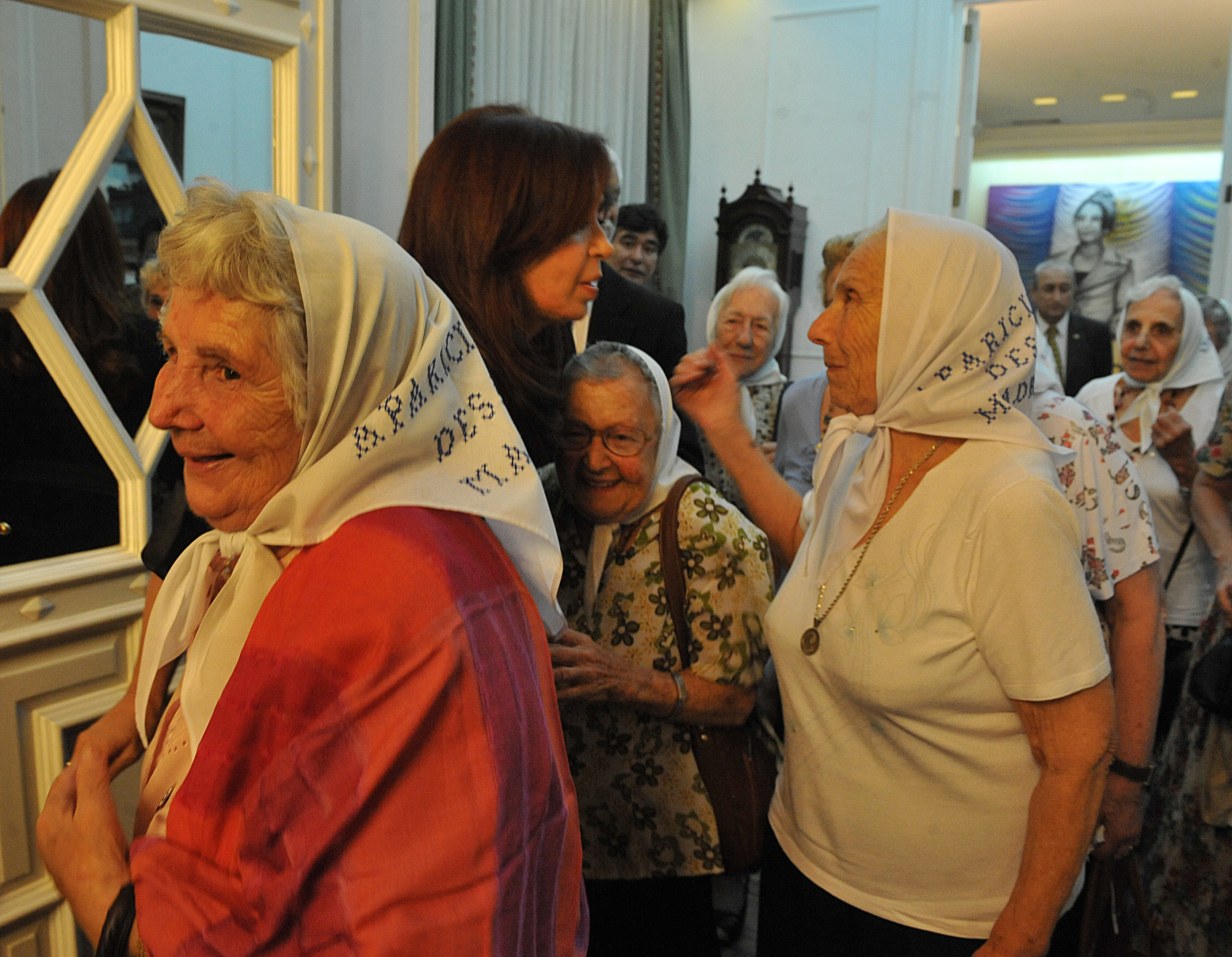 La presidenta Cristina Fernández saluda a miembros de la Asociación Madres de Plaza de Mayo, durante una audiencia en el despacho presidencial de Casa de Gobierno